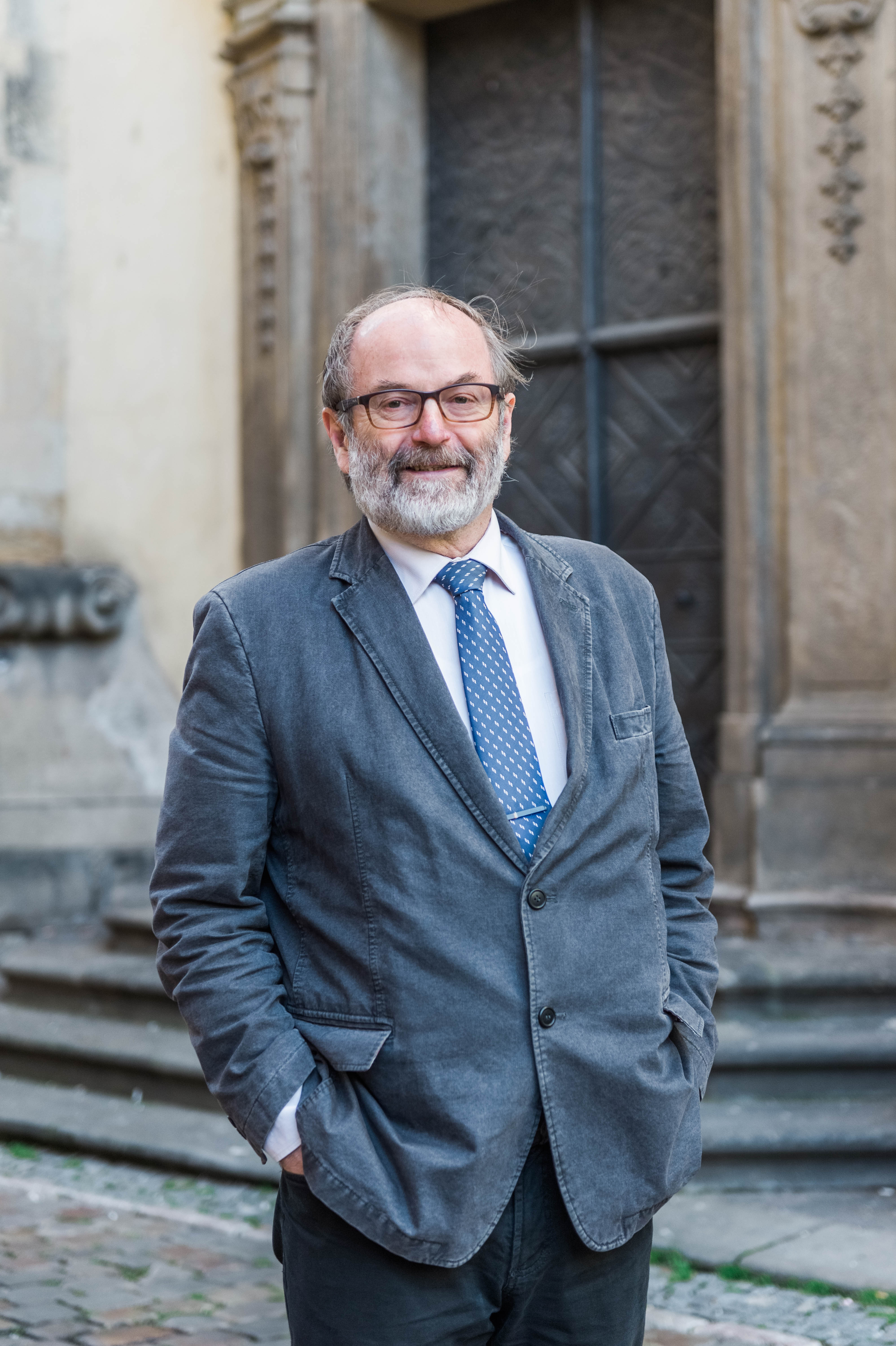 Petr Sommer (* 30. listopadu 1949 Rakovník) je český historik a archeolog, ředitel Centra medievistických studií Akademie věd České republiky a Univerzity Karlovy v Praze. Odborně se zabývá církevní archeologií a středověkou duchovní kulturou.